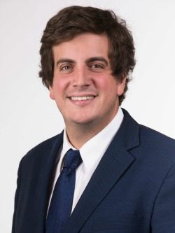 Diego Schalper en la fotografía oficial de diputados periodo 2018-2022. (Fotos: Christel Andler, René Lescornez, Johanna Zárate)